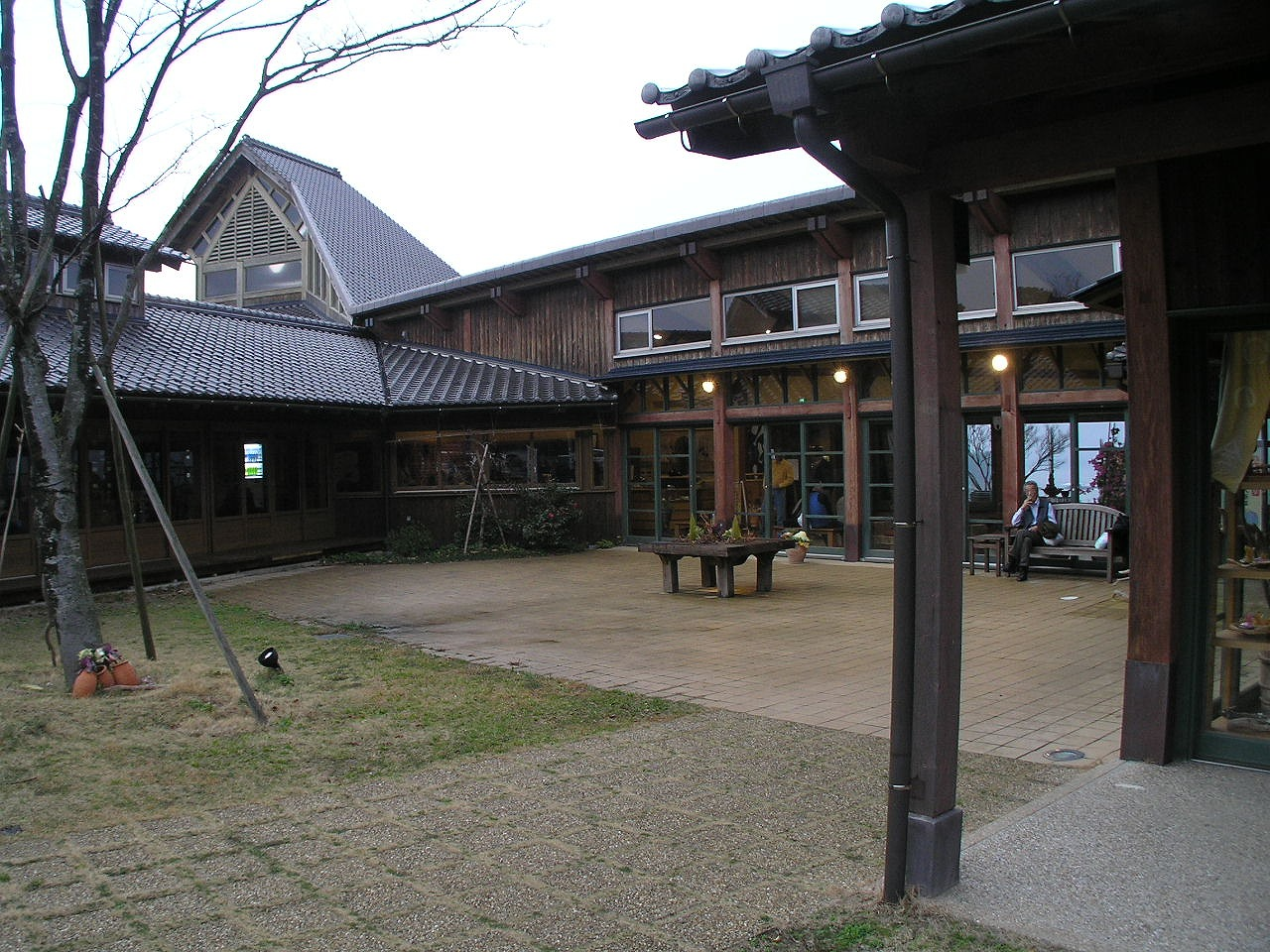 ウッディな宇川温泉外観